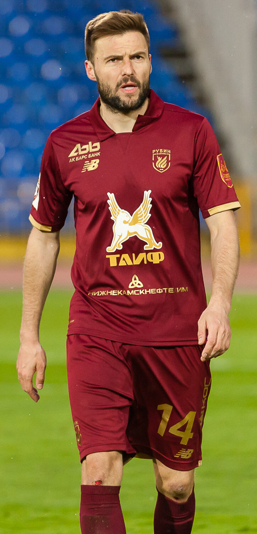 Боевая ничья: «Ростов» на выезде отобрал очки у «Рубина»